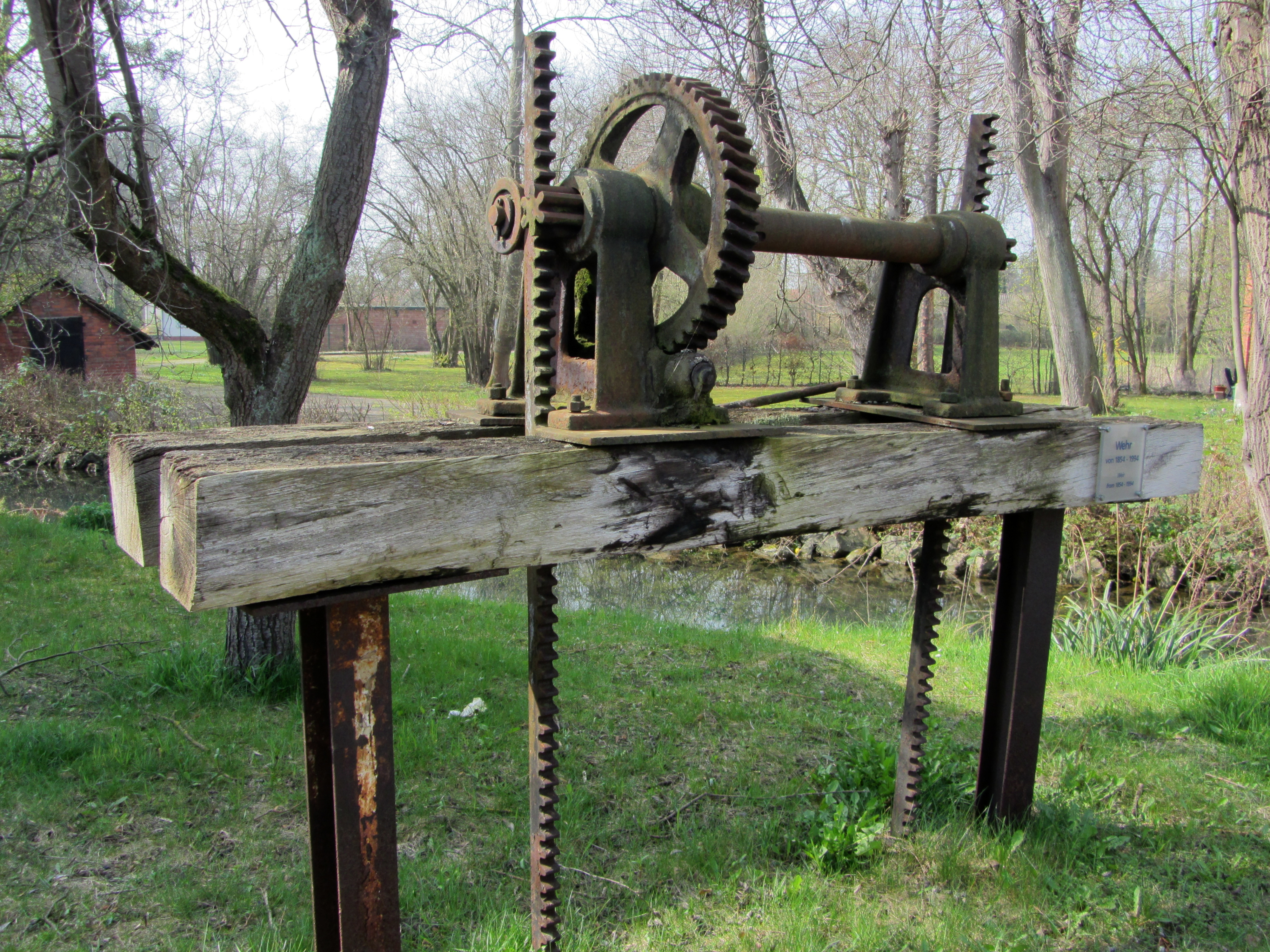 Das auf dem Werksgelände ausgestellte Alte Wehr. Neben der Nähe zur Stadt Göttingen war die durch den Bach Grone vorhandene Wasserkraft eine entscheidende Voraussetzung für die Errichtung der Saline.